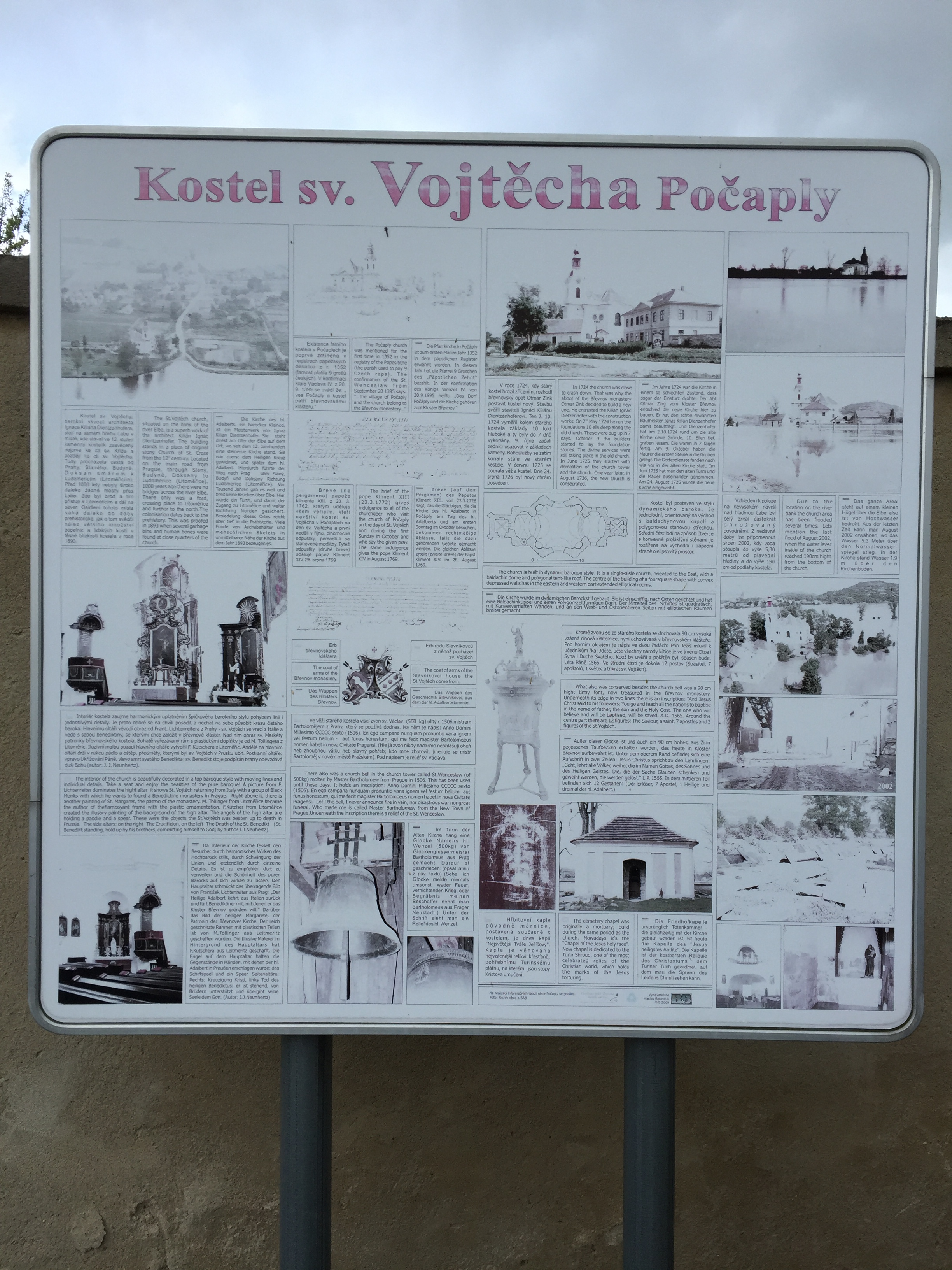 Informační cedule ve třech jazycích poblíž kostela sv. Vojtěcha v Počaplech